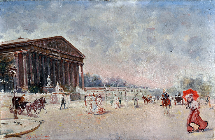 Boulevard à Paris, olio su tela, cm 27 x 41, firmato, coll. privata